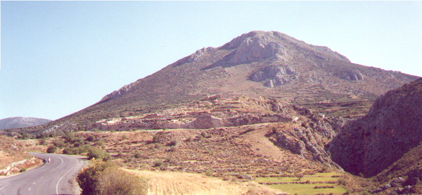 eigen foto